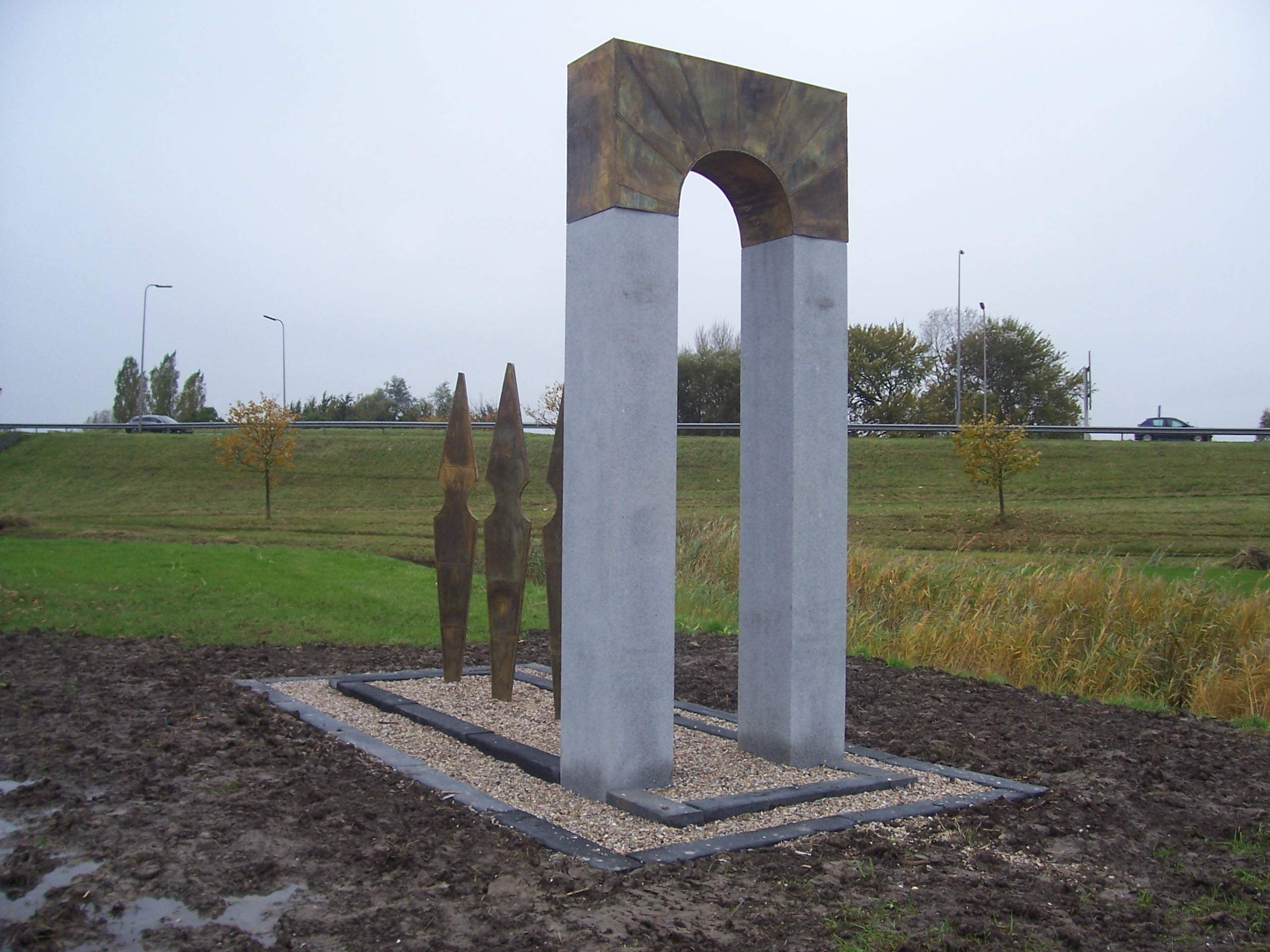 Romeinse poort met granieten zuilen met boogvormige architraaf (4 meter hoog) en drie speren (3 meter hoog).